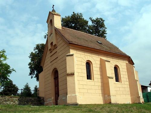 Pohřební kaple Bukuwků (Dobromilice), u kostela, Dobromilice